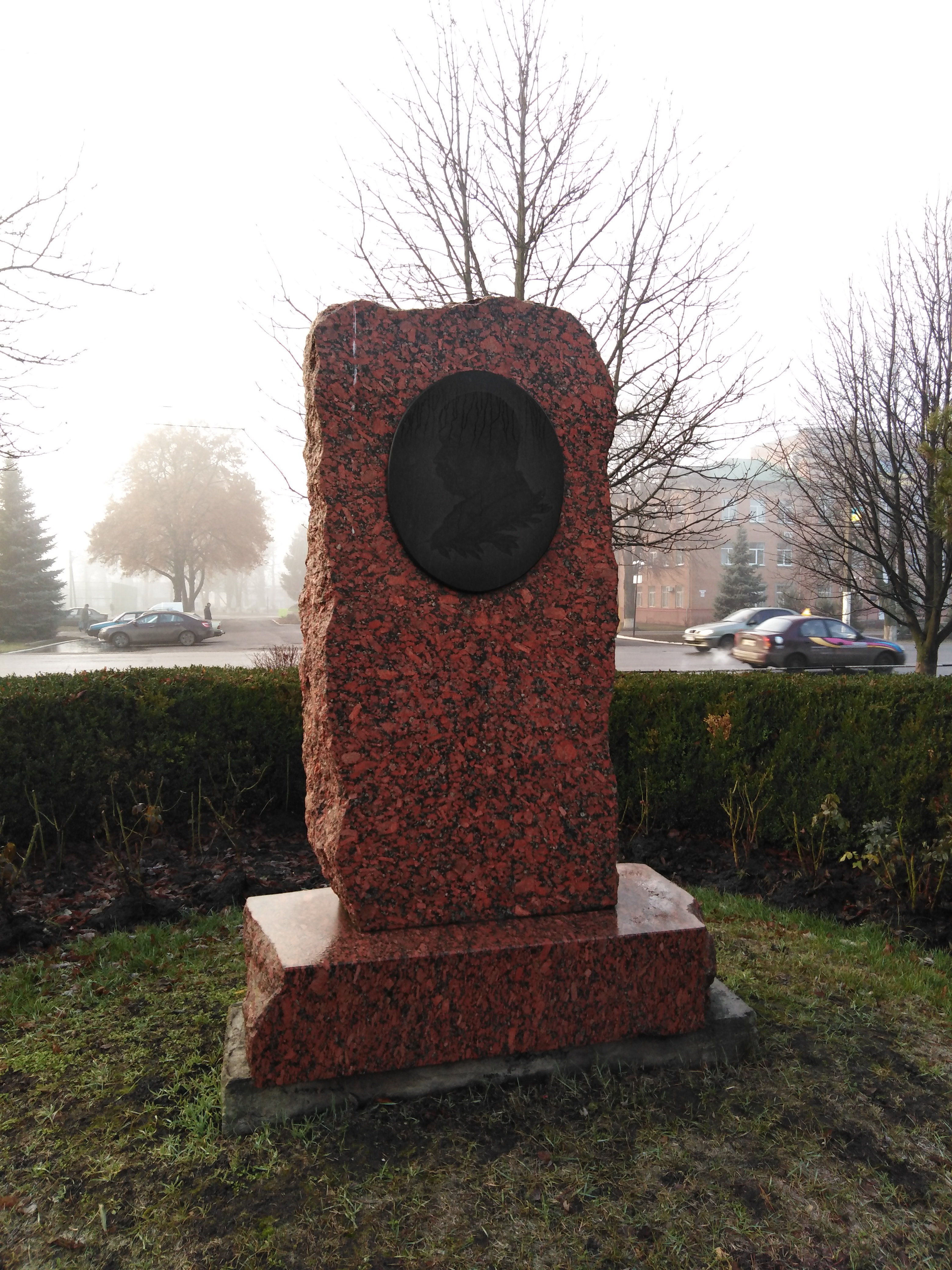 Україна, Полтавська область, м. Карлівка. Монумент Т.Г. Шевченку, біля Краєзнавчого музею. Вулиця Полтавський Шлях.